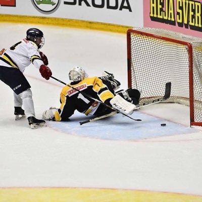 Här gör Rasmus Sandin en Foppa straff i TV-pucken.